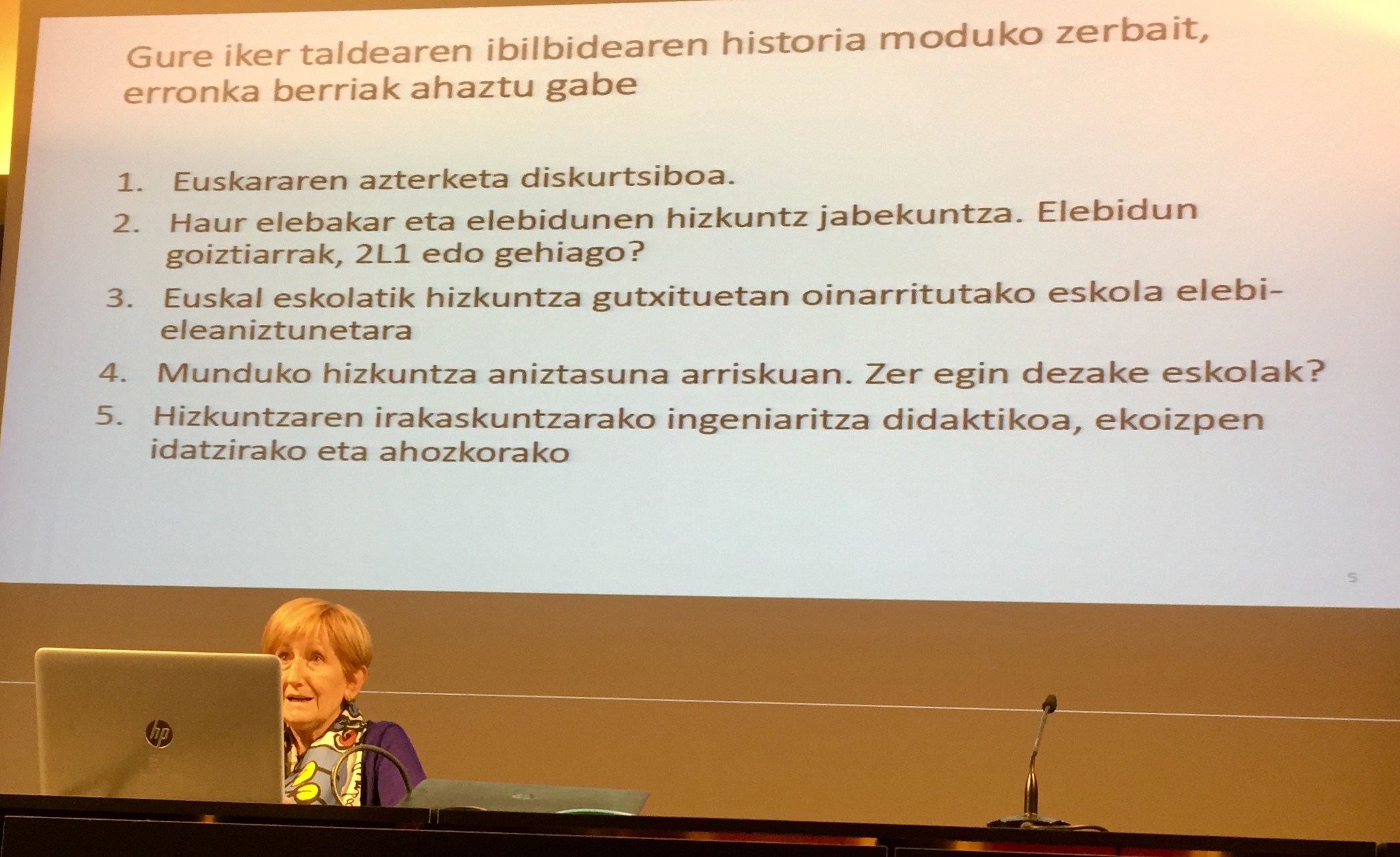 Itziar Idiazabal hizkuntzalari eta psikolinguista